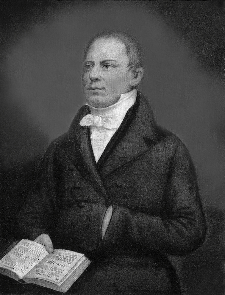 Ludwig Friedrich Heyd mit Bibel